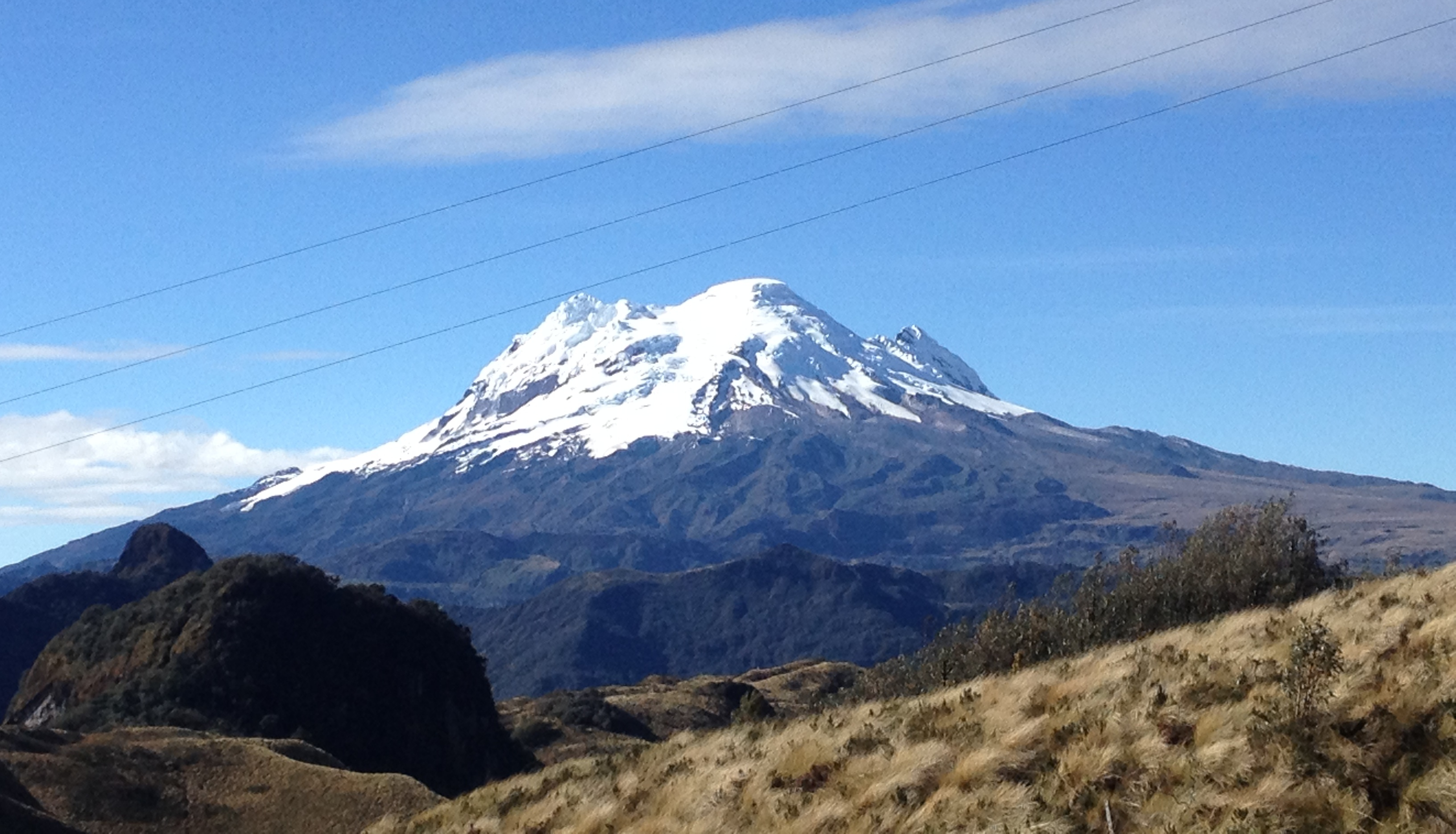 Vistas del vlcán Papallacta. Nevado